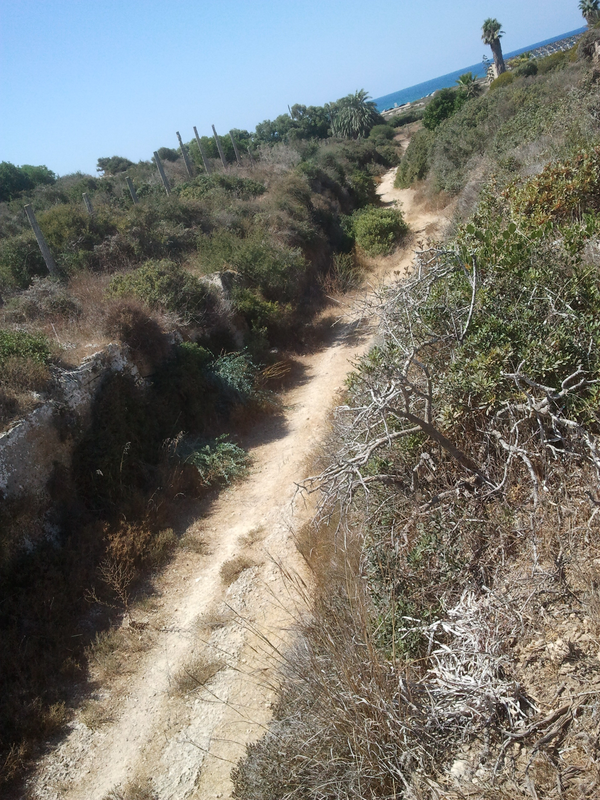 שמורת טבע חורבת קרתא, שוכנת במישור חוף הכרמל ליד עתלית. השמורה שוכנת מדרום למחנה המעצר בעתלית. השמורה משמרת את רכס הכורכר ובתי הגידול האופייניים לו וכן את האתר הארכאולוגי מבצר דטרוא הנמצא בתחומו